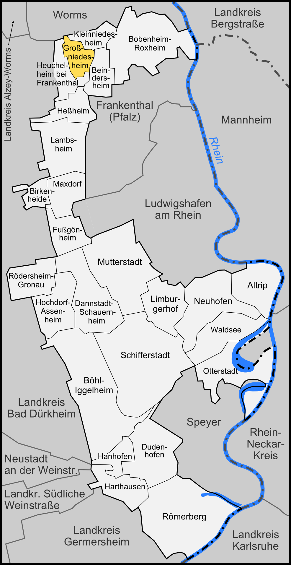 Karte der Gemeinde Großniedesheim im Rhein-Pfalz-Kreis